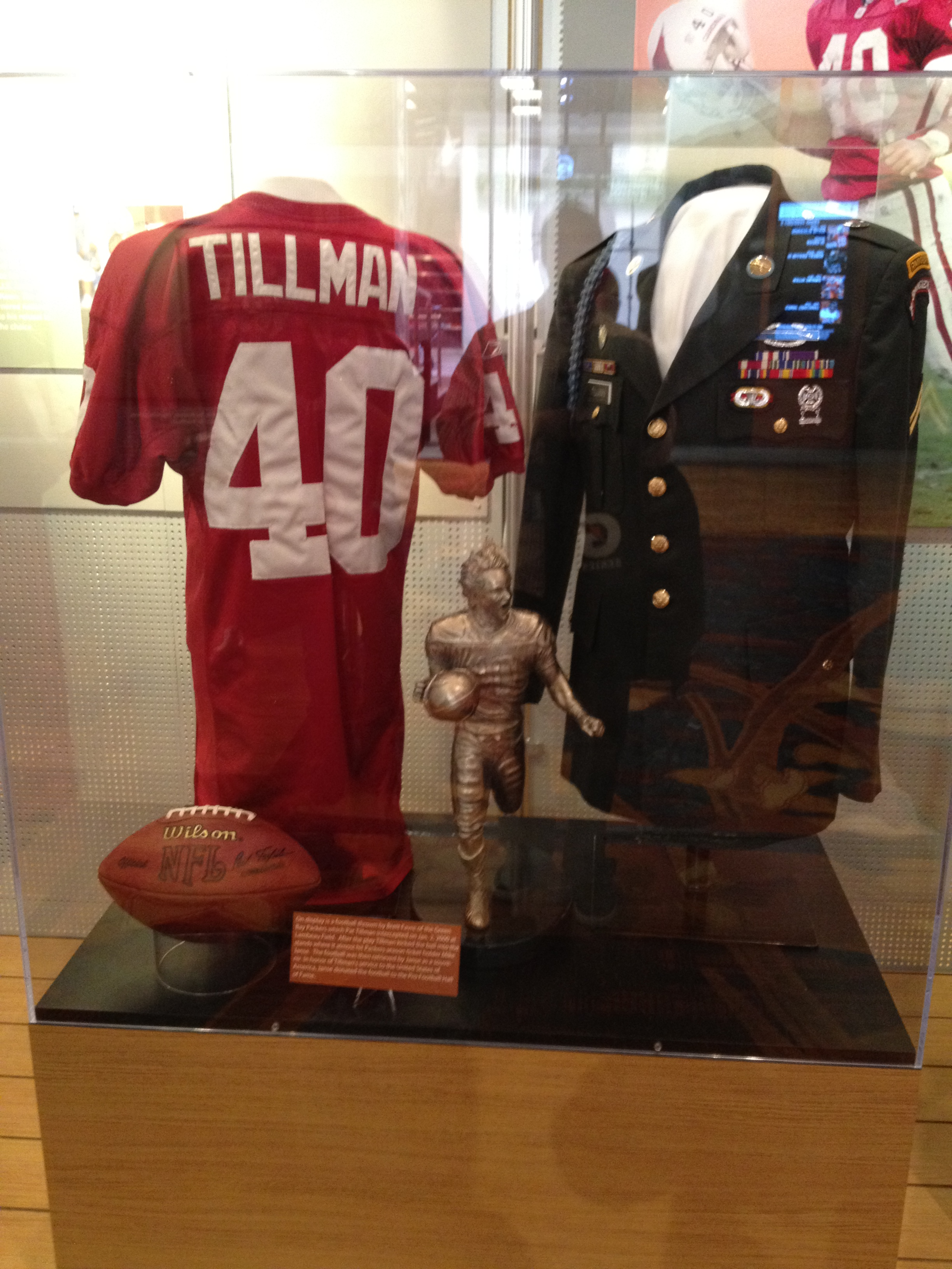 Tillman's jersey